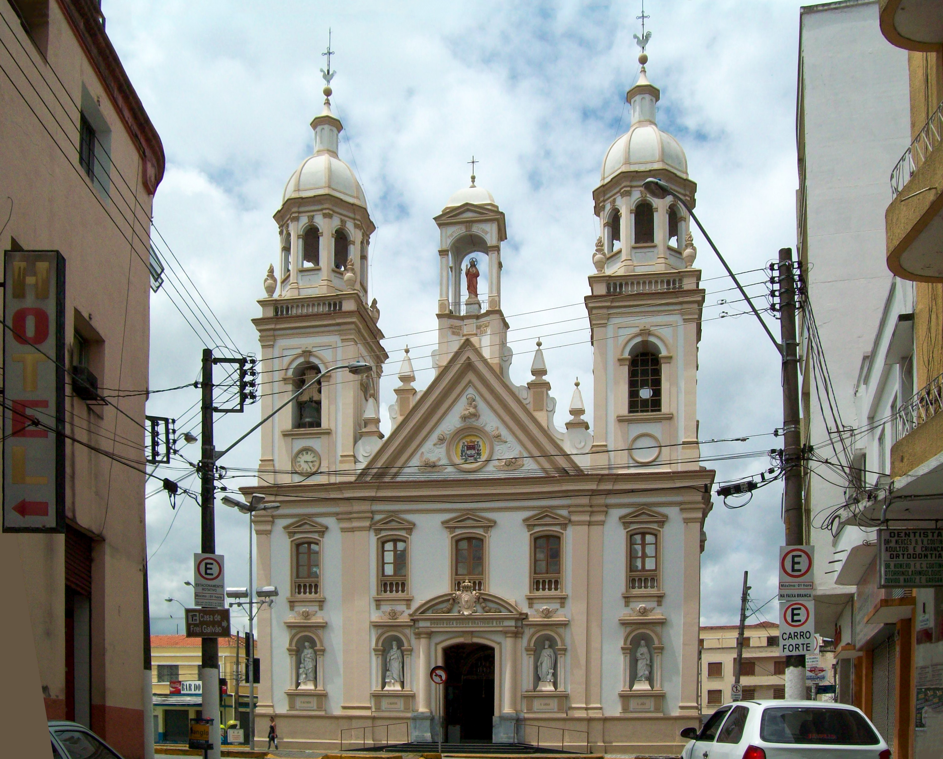 Guaratinguetá SP Brasil - Matriz